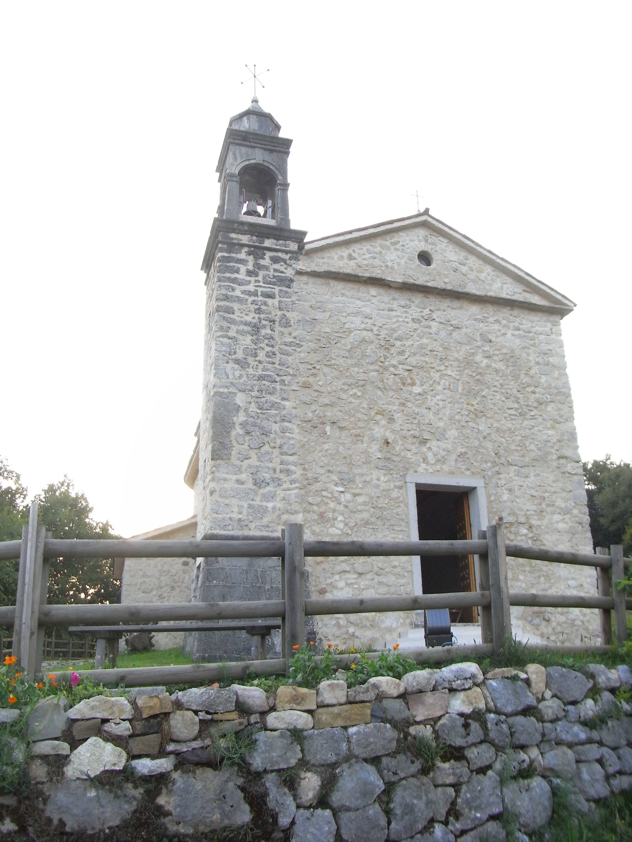 Chiesa di Santa Margherita a Rotzo, provincia di Vicenza (opera propria, 18 agosto 2008, Lingtft